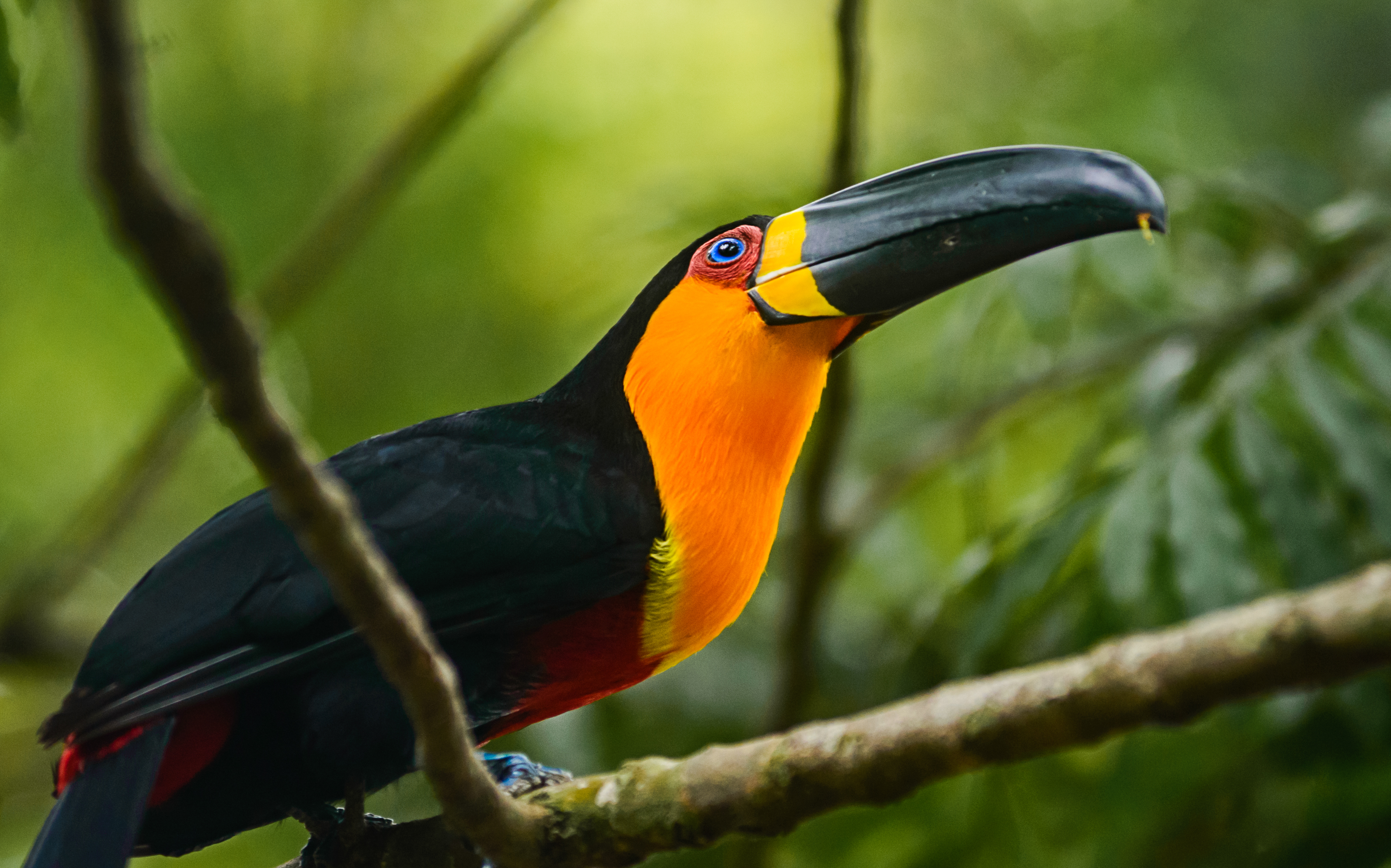 Ramphastos vitelinus ariel Fotografado no Jardim Botânico do Rio de Janeiro.